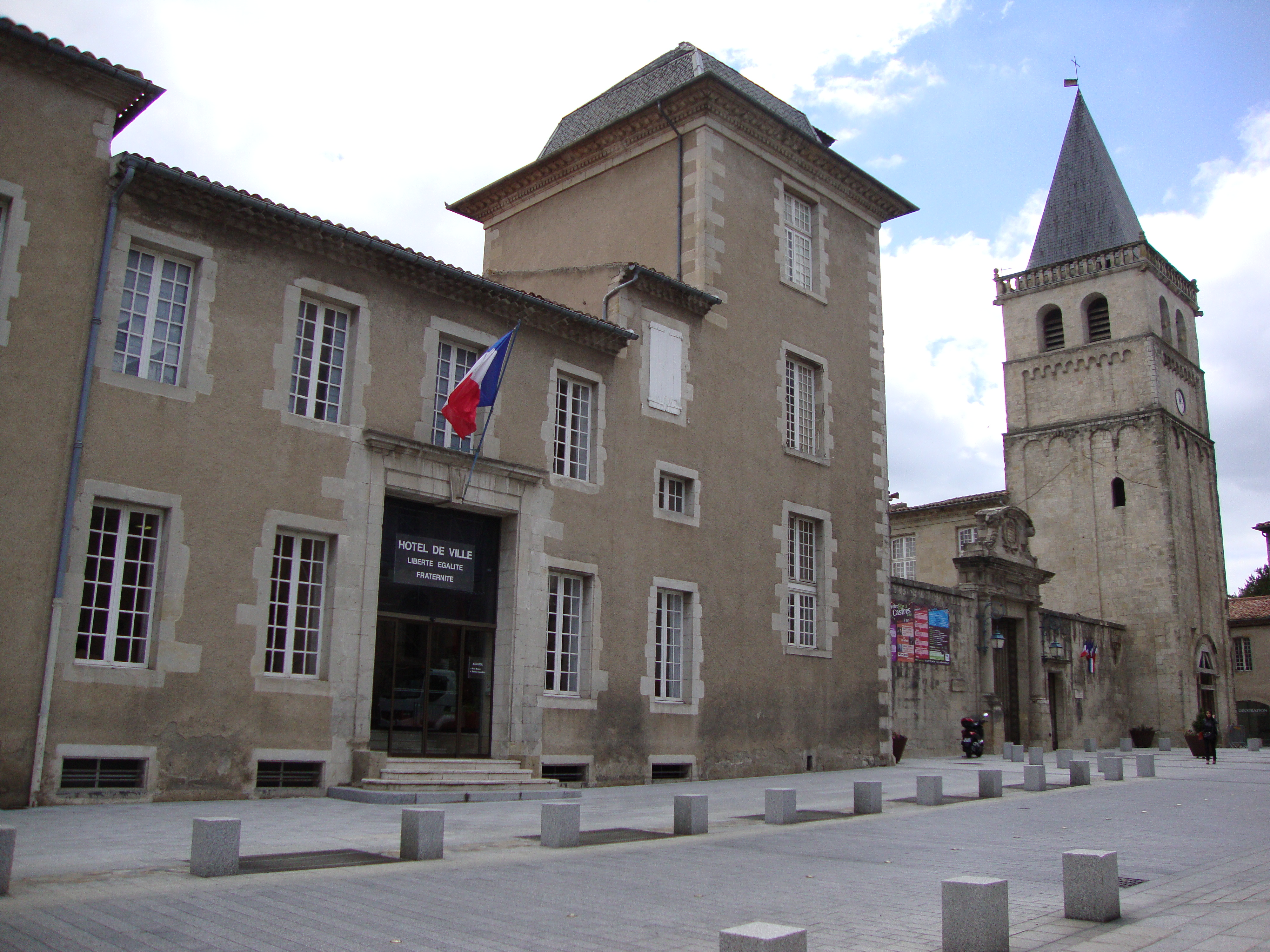 Castres (Tarn, Fr) hôtel de ville et musée